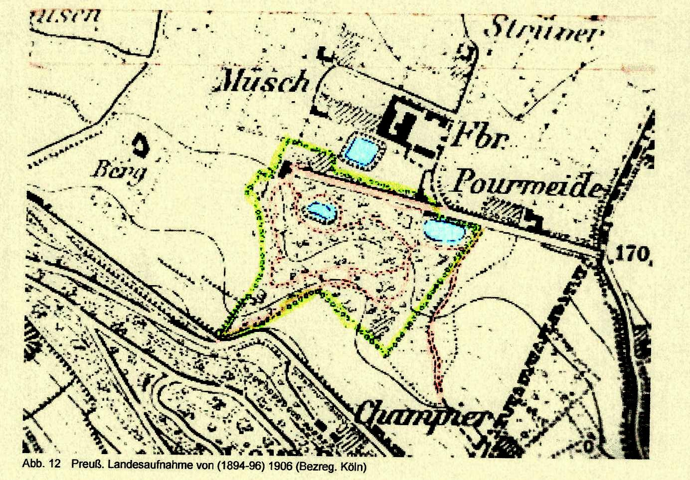 selbst bearbeitete Kopie einer preuß. Landesaufnahme aus den Jahren 1894-1896